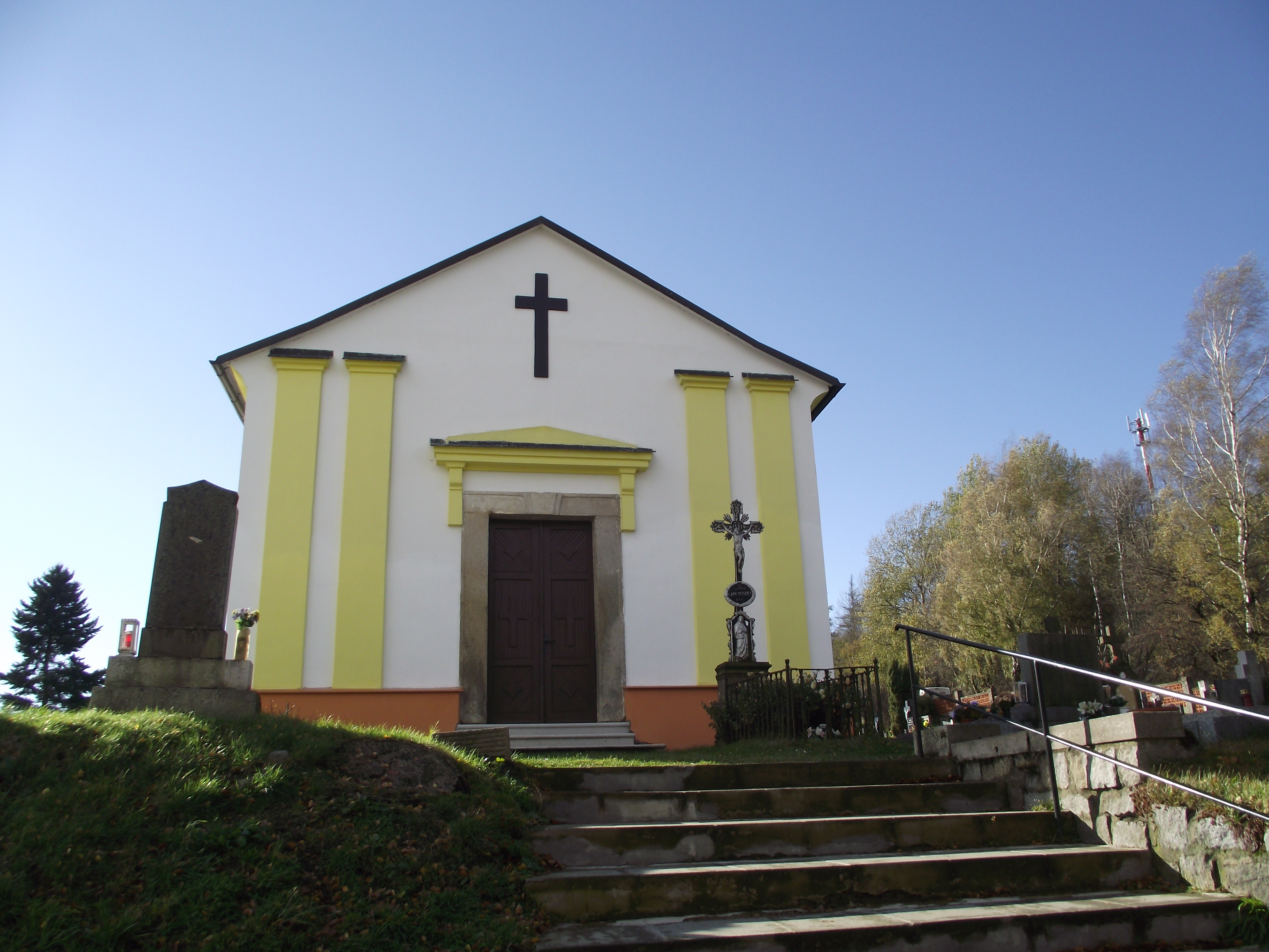 Lukavec, okres Pelhřimov. Hřbitov a kaple Panny Marie.